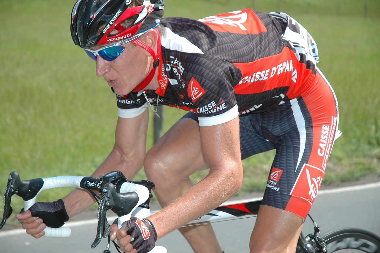 Vladimir Efimkin, Euskal Bizikleta 2007, winner 2nd stage part A